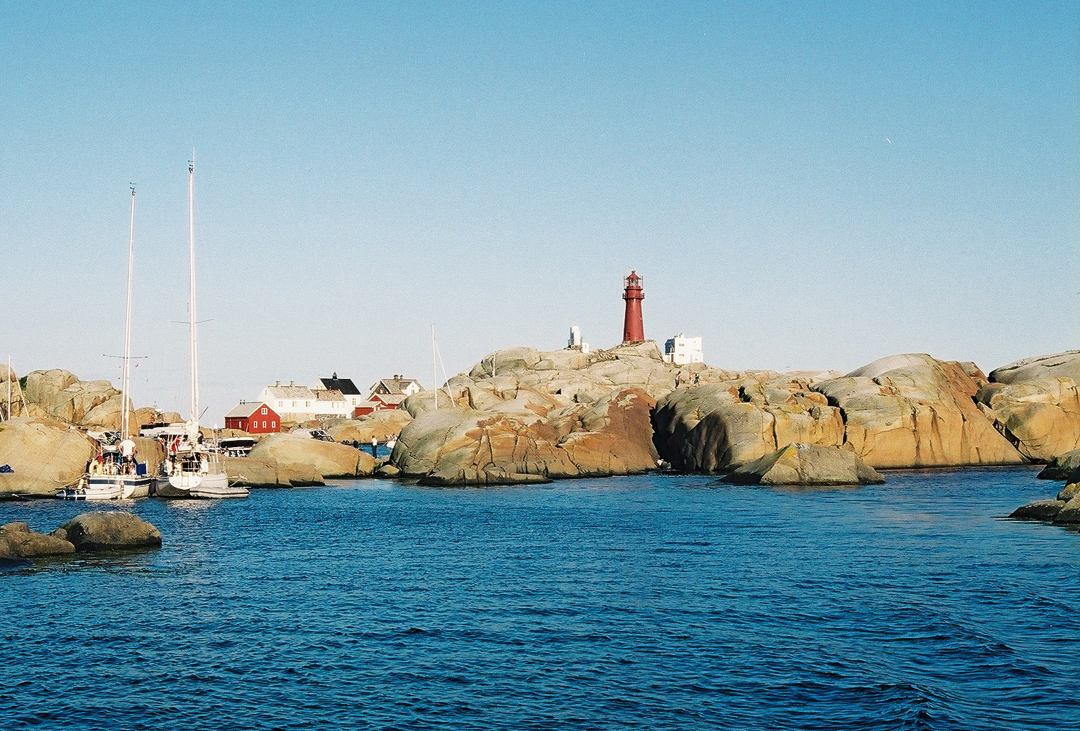 Svenner fyr, Larvik, Vestfold. Bygd 1900 i støpejern. Freda.